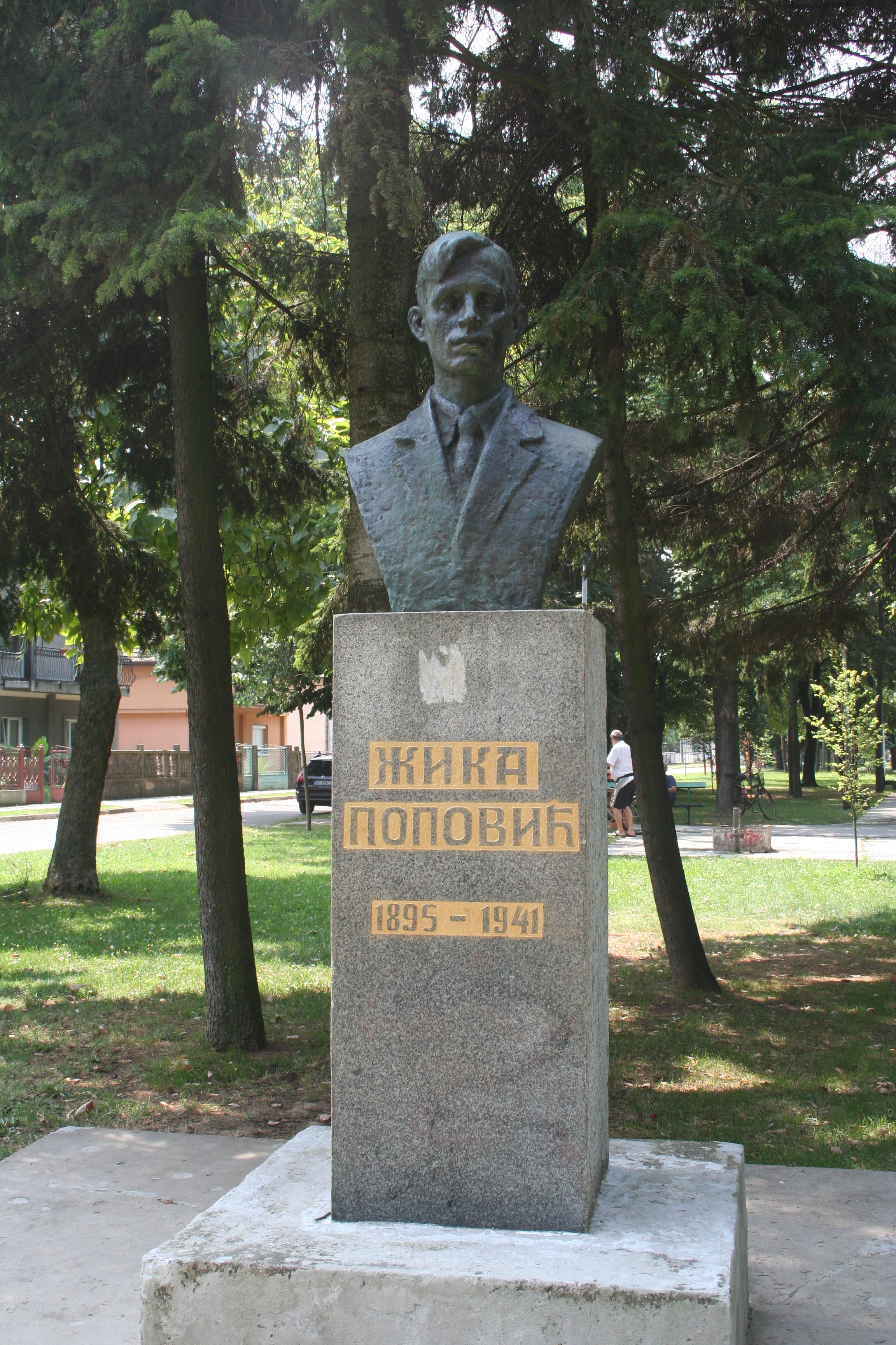 Spomenik Žiki Popoviću, Šabac